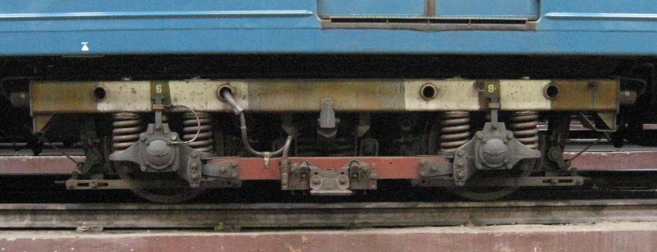 Вагон модели 81-714. Тележка со шпинтонной конструкцией буксового узла